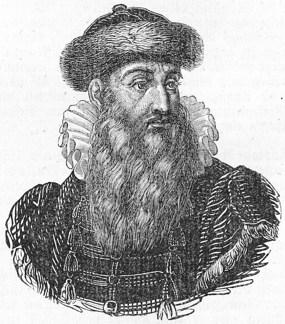 Johannes Gutenberg